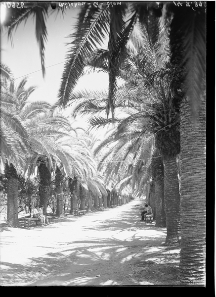 ראשון לציון, שדרת הדקלים בגן המושבה